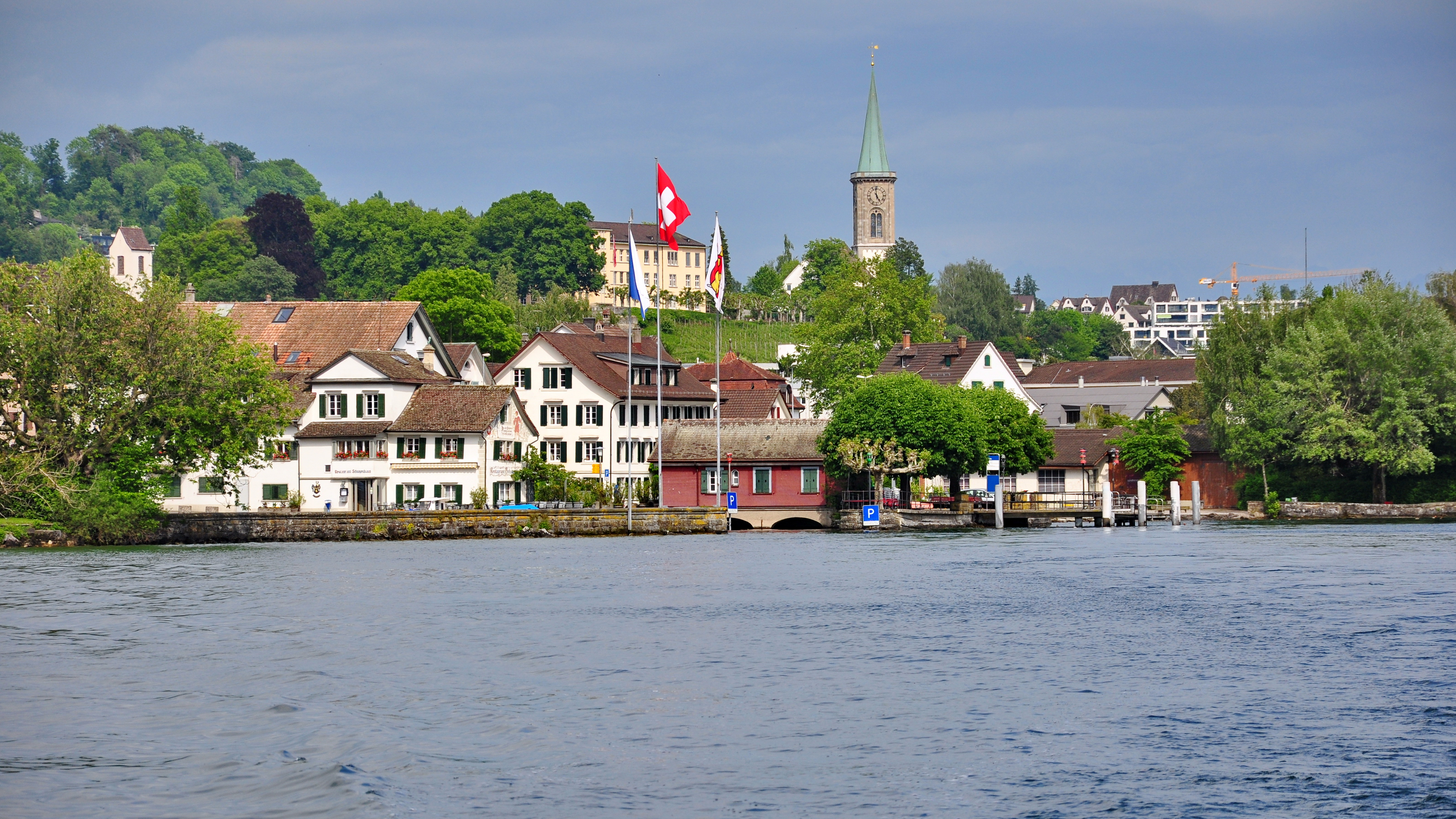 Stäfa and Pfannenstiel (Switzerland), as seen from Lake Zürich